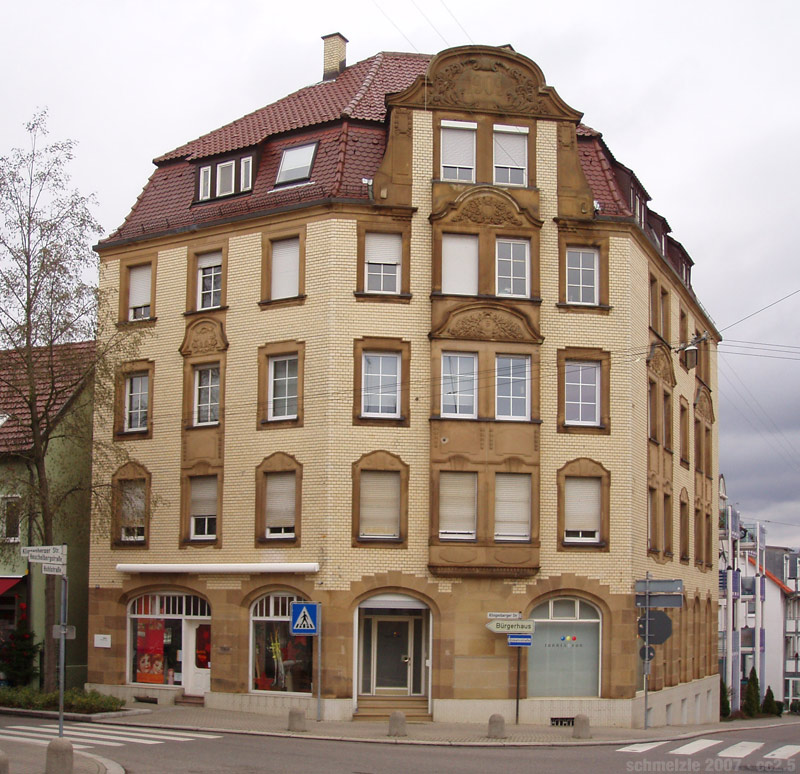 Haus Herschleb in der Klingenberger Str. 105 in Heilbronn-Böckingen, denkmalgeschütztes Gebäude